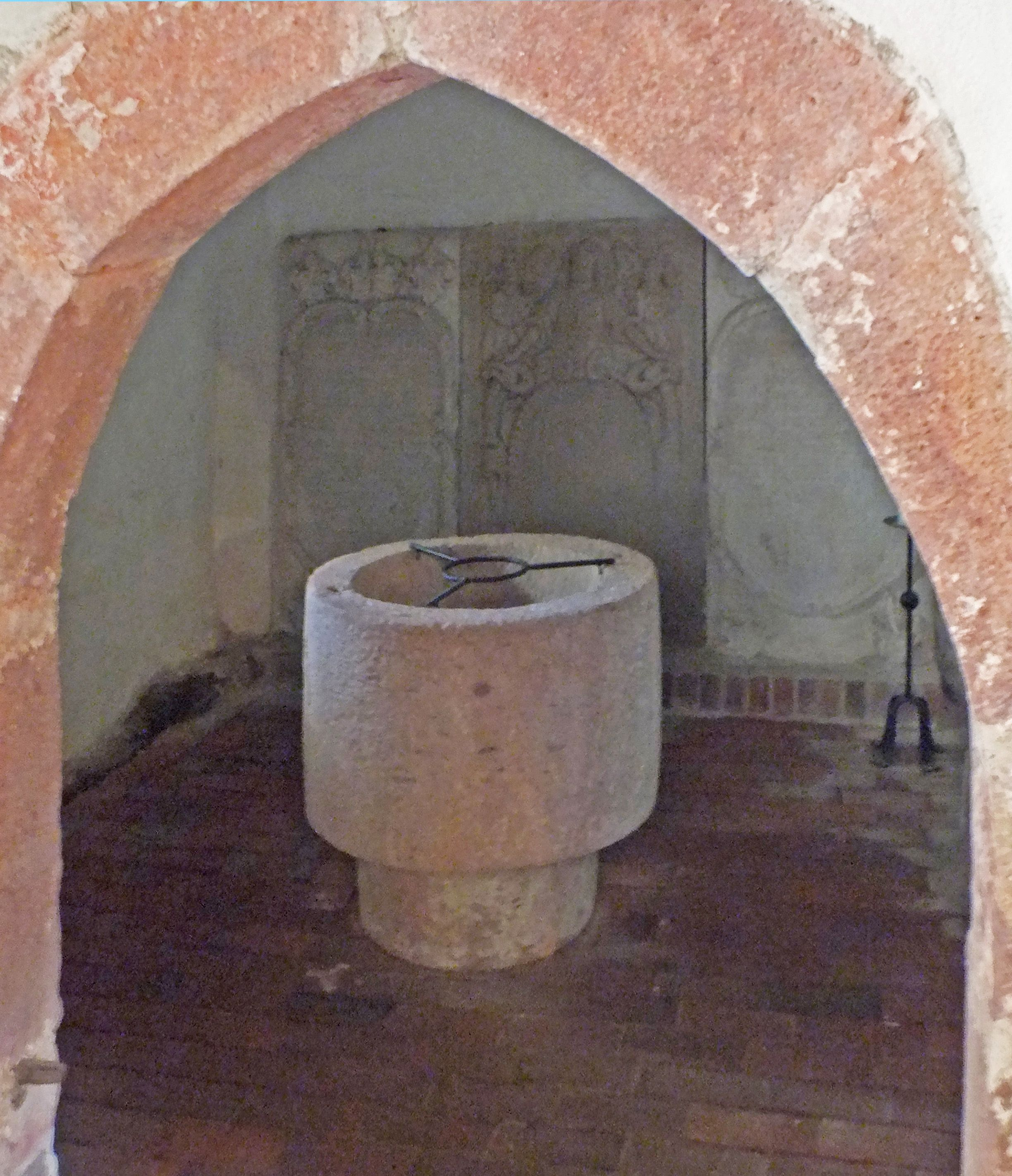 Historischer Taufstein im Turm der Wehrkirche Pomßen